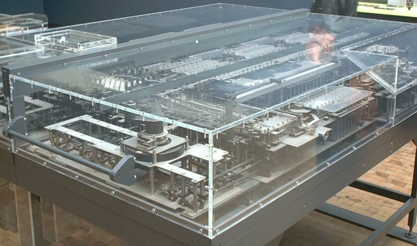 Nachbau des Z1 im deutschen Technik Museum in Berlin